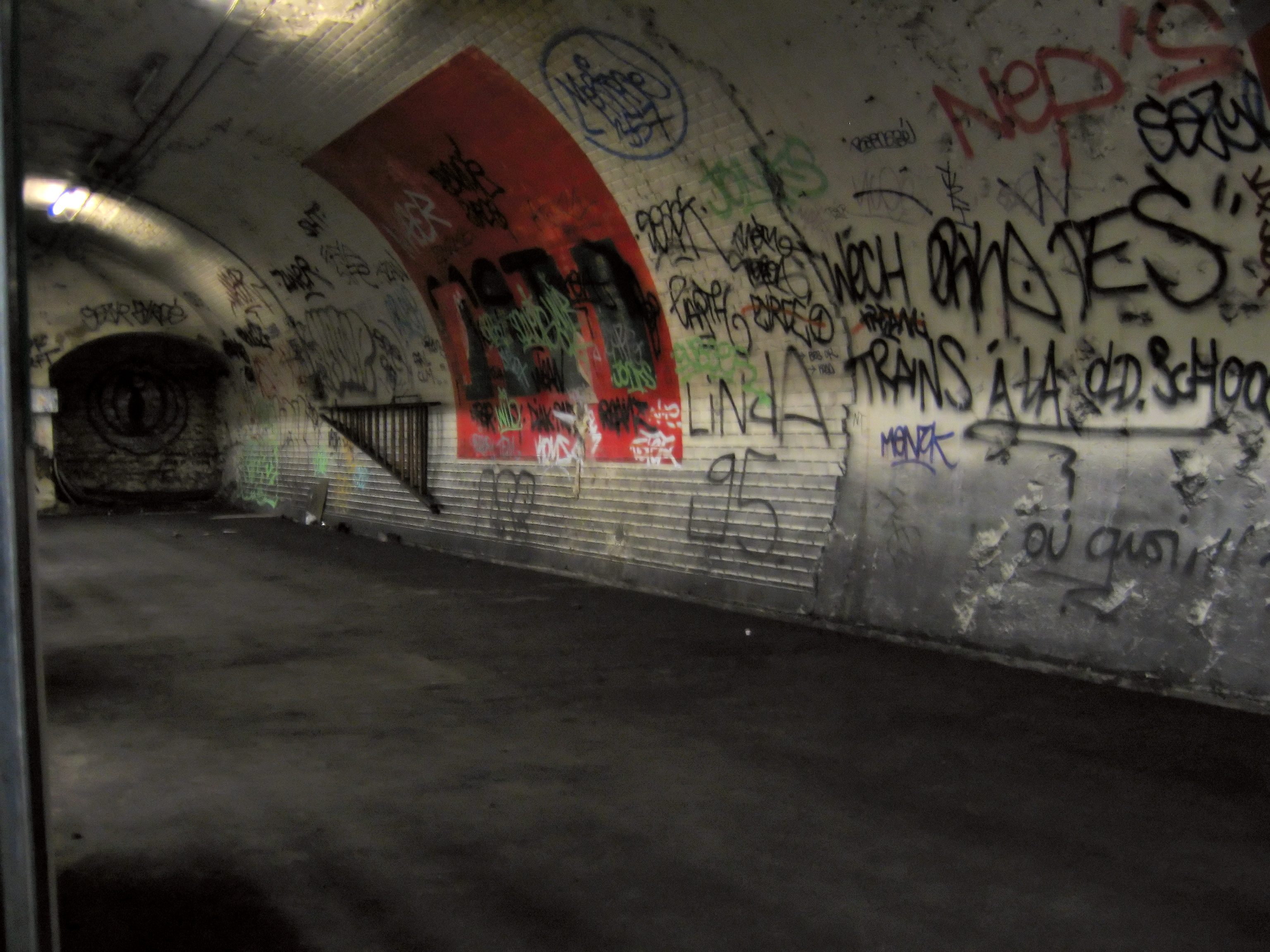 Journées du patrimoine RATP 16-17/09/2006. Haxo, station fantôme.